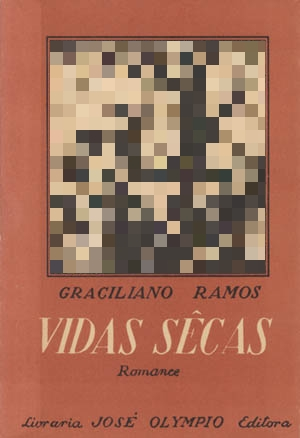 Capa da primeira edição de Vidas Secas, do escritor brasileiro Graciliano Ramos. Publicado em 1938.